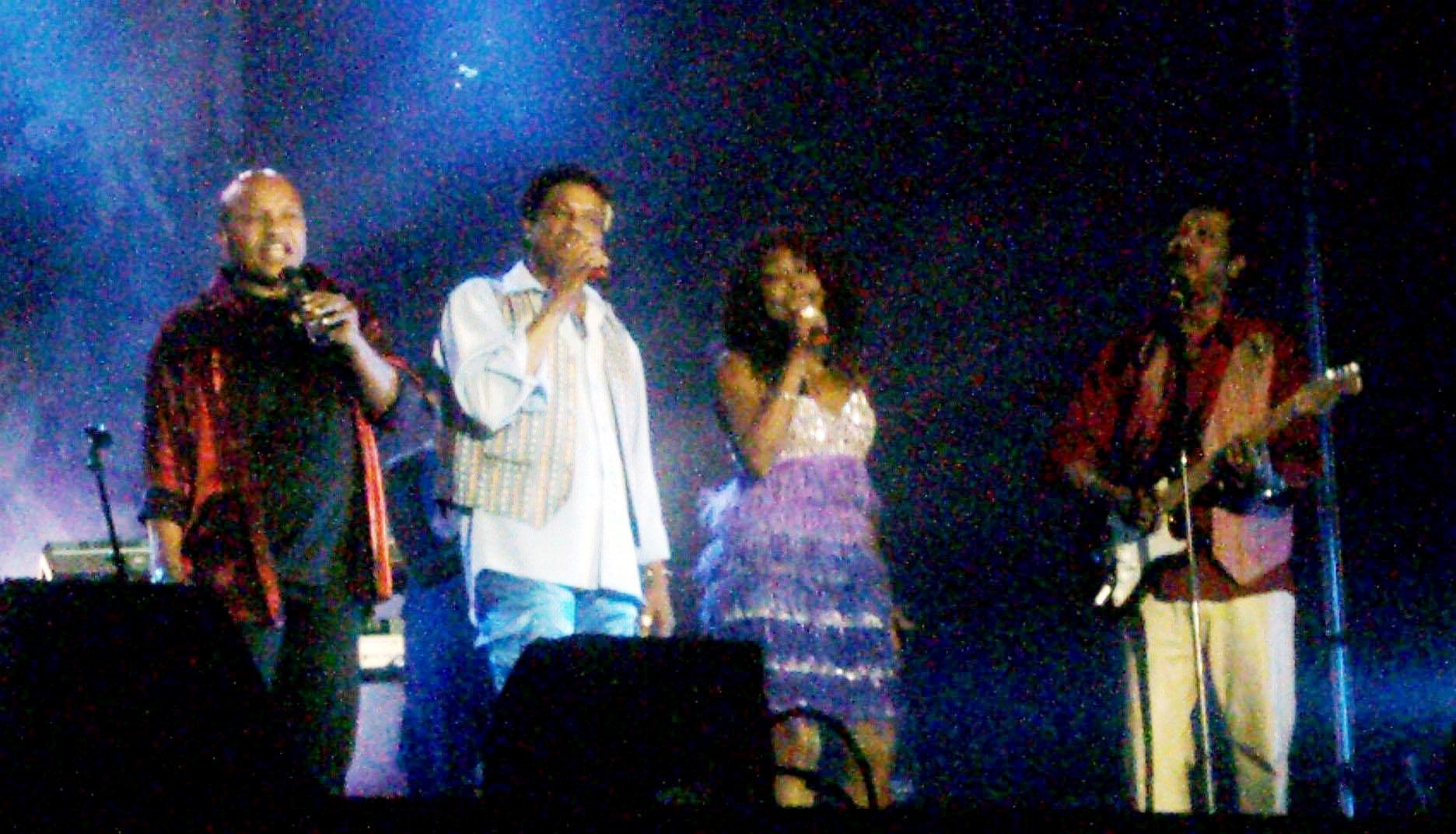 La Compagnie Créole aux FrancoFolies de Montréal